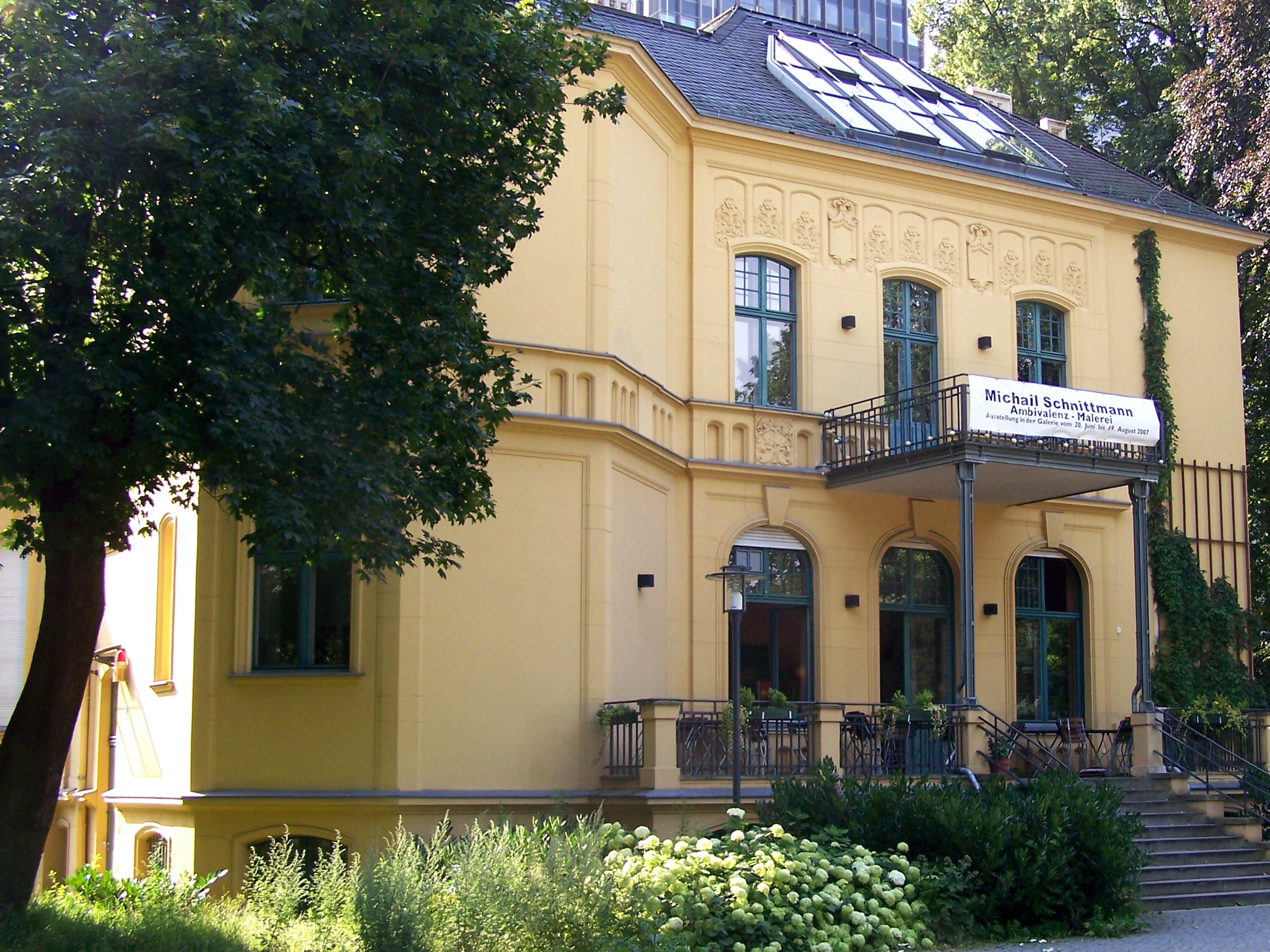 Schwartzsche Villa in Berlin-Steglitz , Grunewaldstraße 55. Architekt: Christian Heidecke